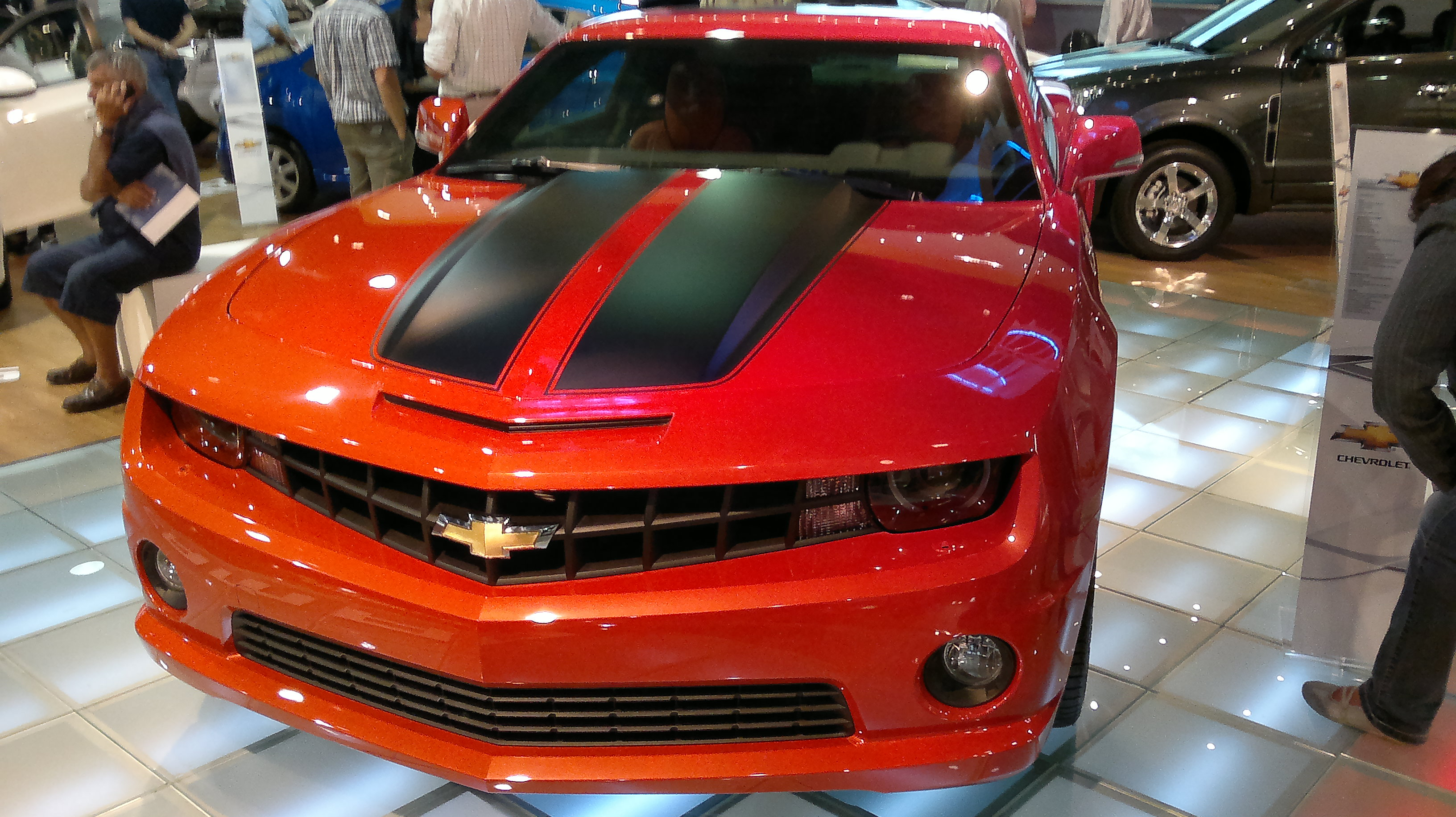 Chevrolet Camaro de color naranja